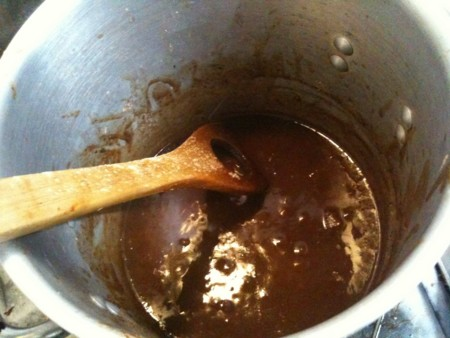 作り途中のドミグラスソース。